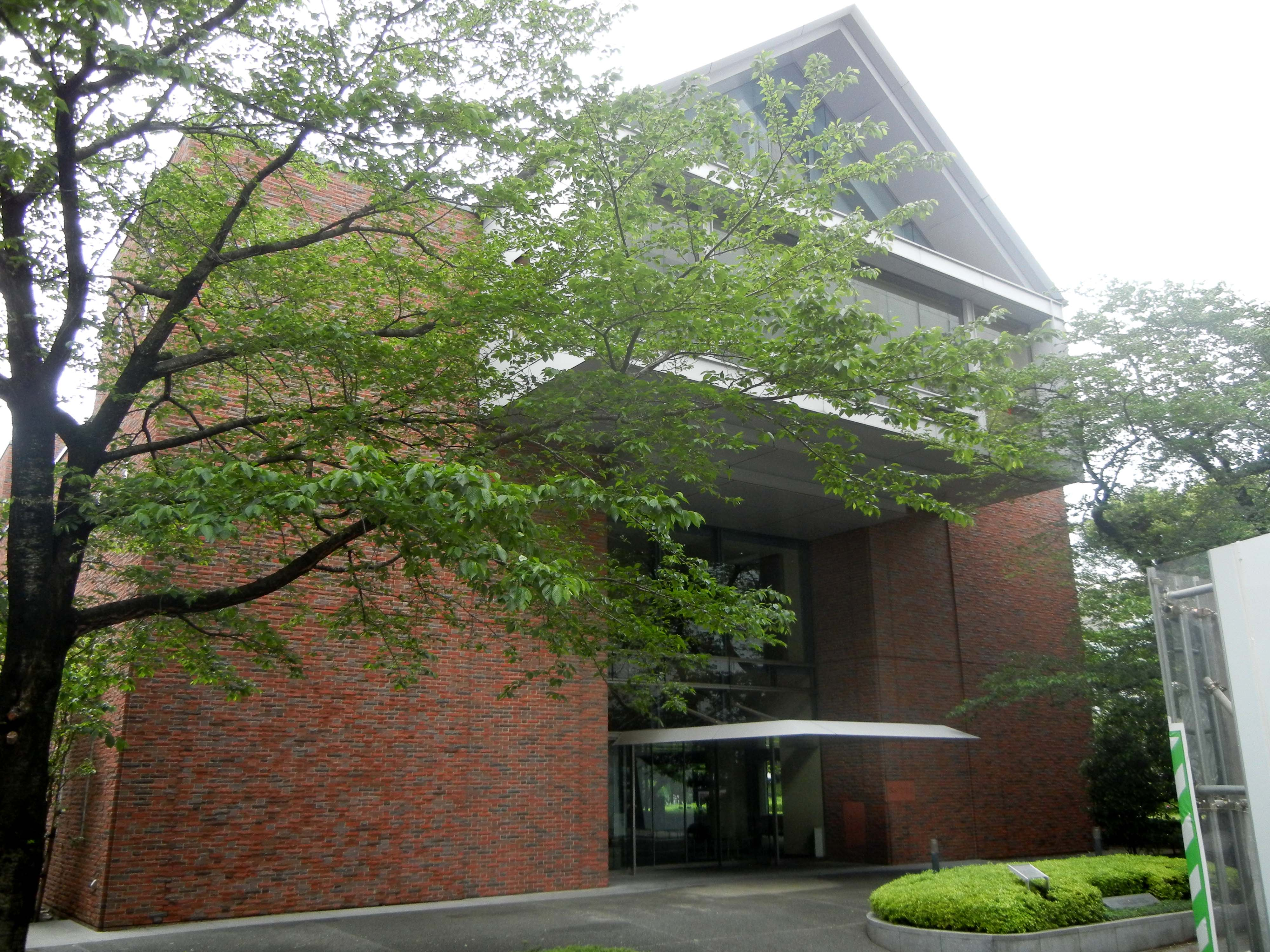 立教大学池袋キャンパス太刀川記念館